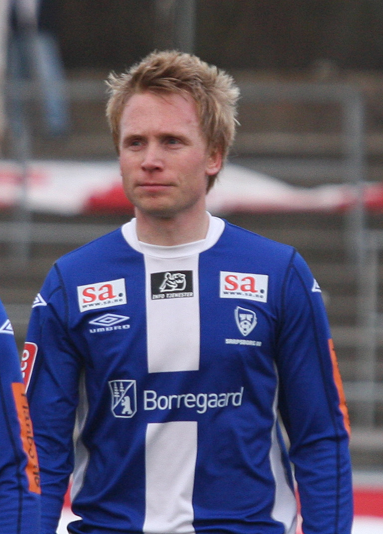 Jon_André_Fredriksen, Sarpsborg 08